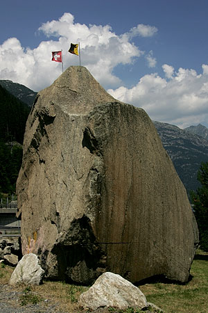 Der 12 m hohe und 220 t schwere Teufelsstein bei Göschenen